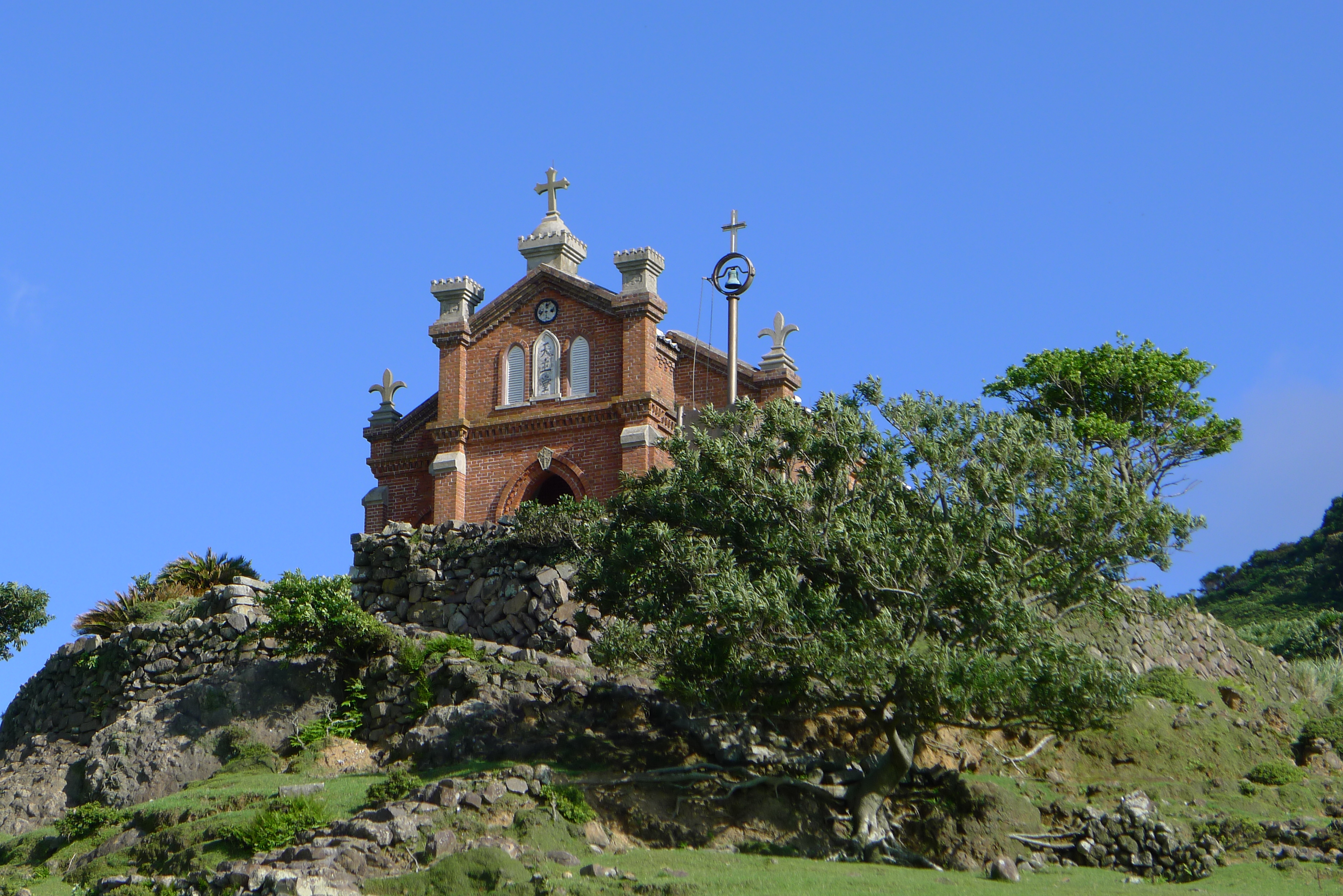 野崎島の旧野首教会 title error：Nokubi Church